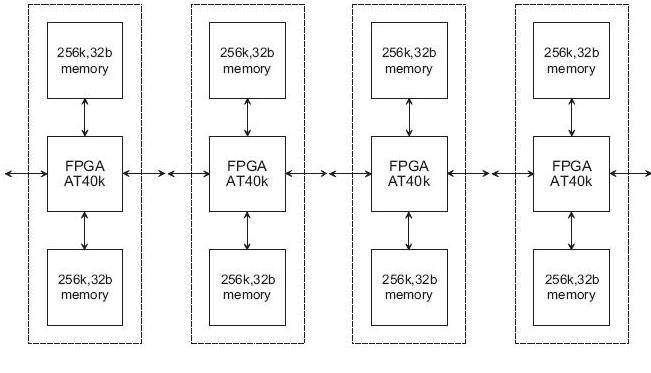 Interconnexion des cartes filles